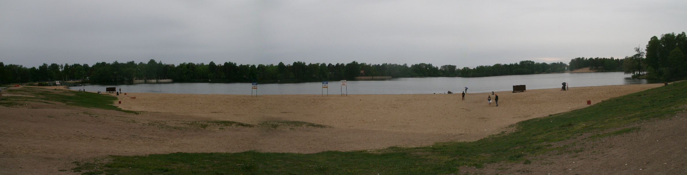 Верхнее озеро из группы Суздальских озёр